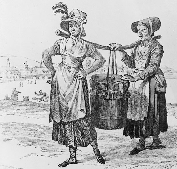 Latrinbärerskor, så kallade "skitbärarkärringar"